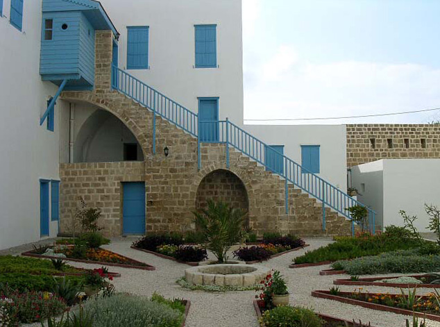 House of `Abdu'lláh Páshá